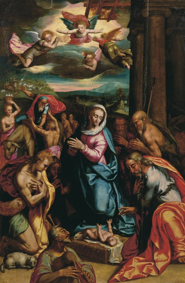 Adoración de los pastores, colección particular